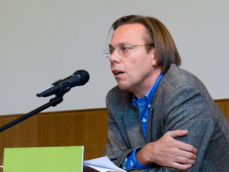 Harald Welzer, Sozialpsychologe